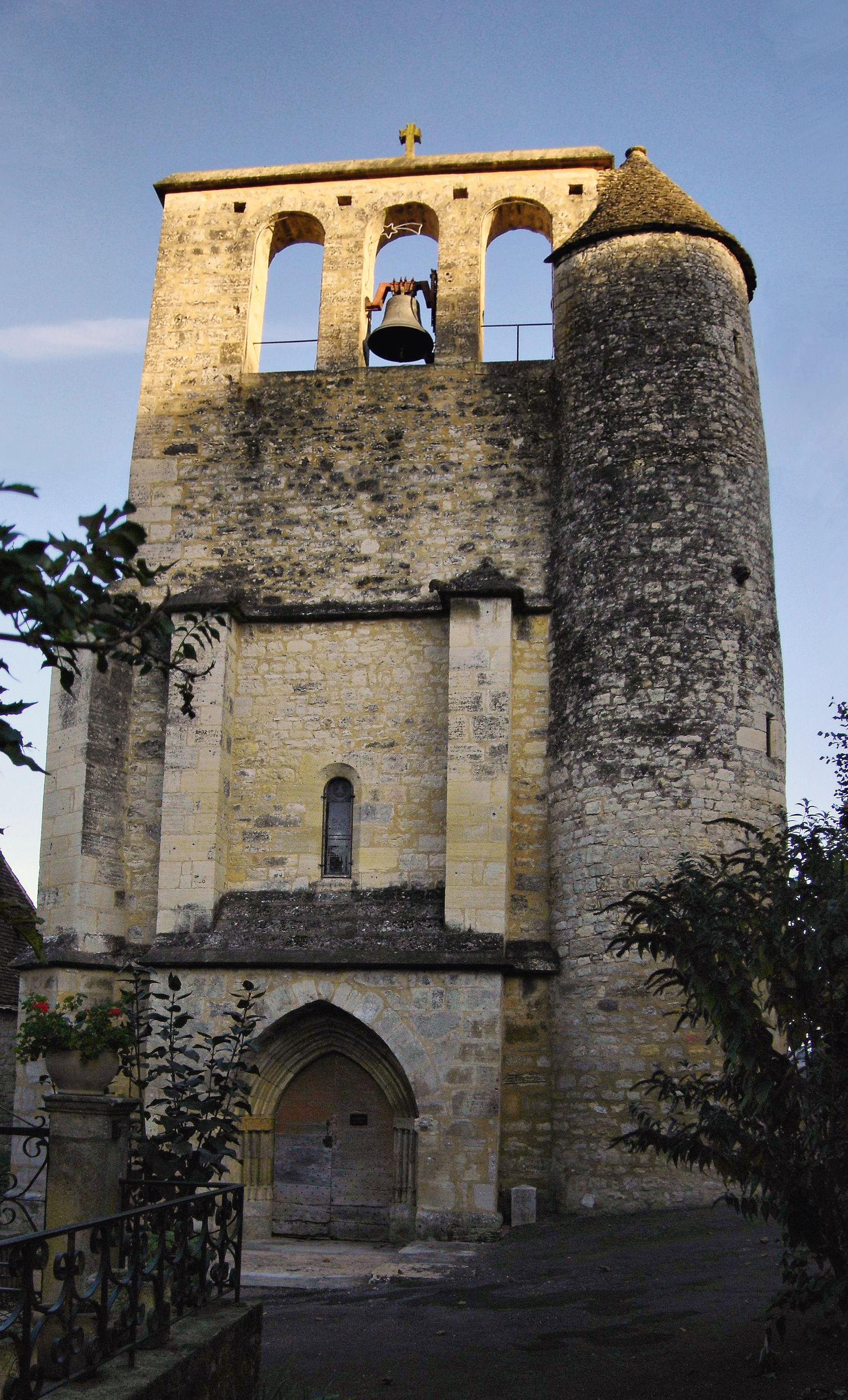 Église Sainte-Croix